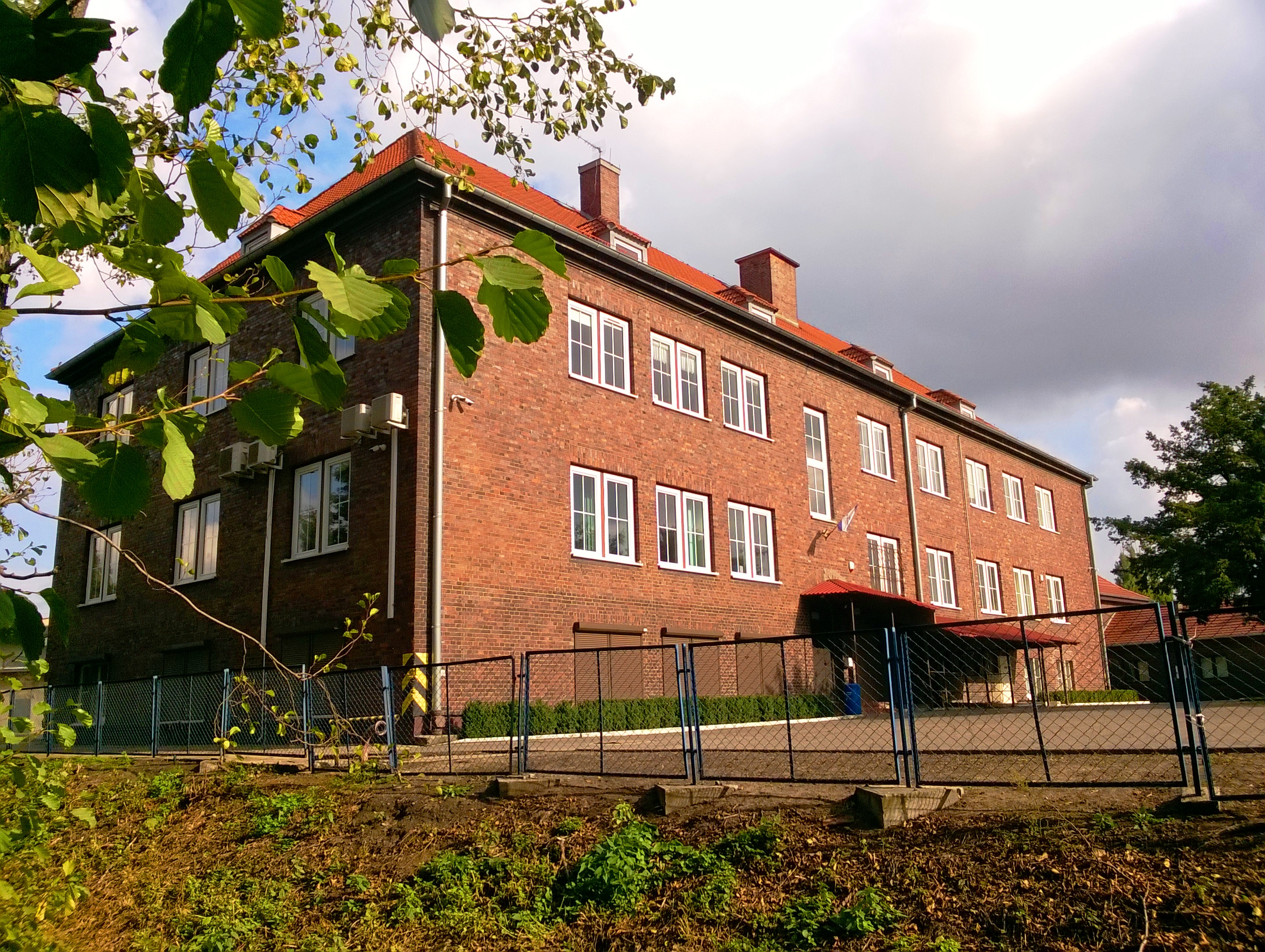 Zakład Linii Kolejowych w Toruniu